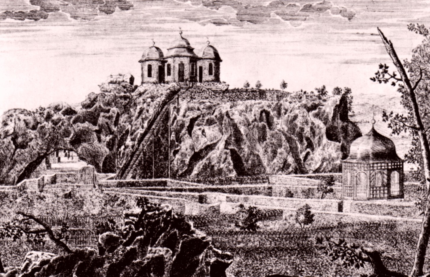 Felsengarten Sanspareil (Franken, Bayern), Belvedere, Kalypsogrotte und Tanzhaus 1748